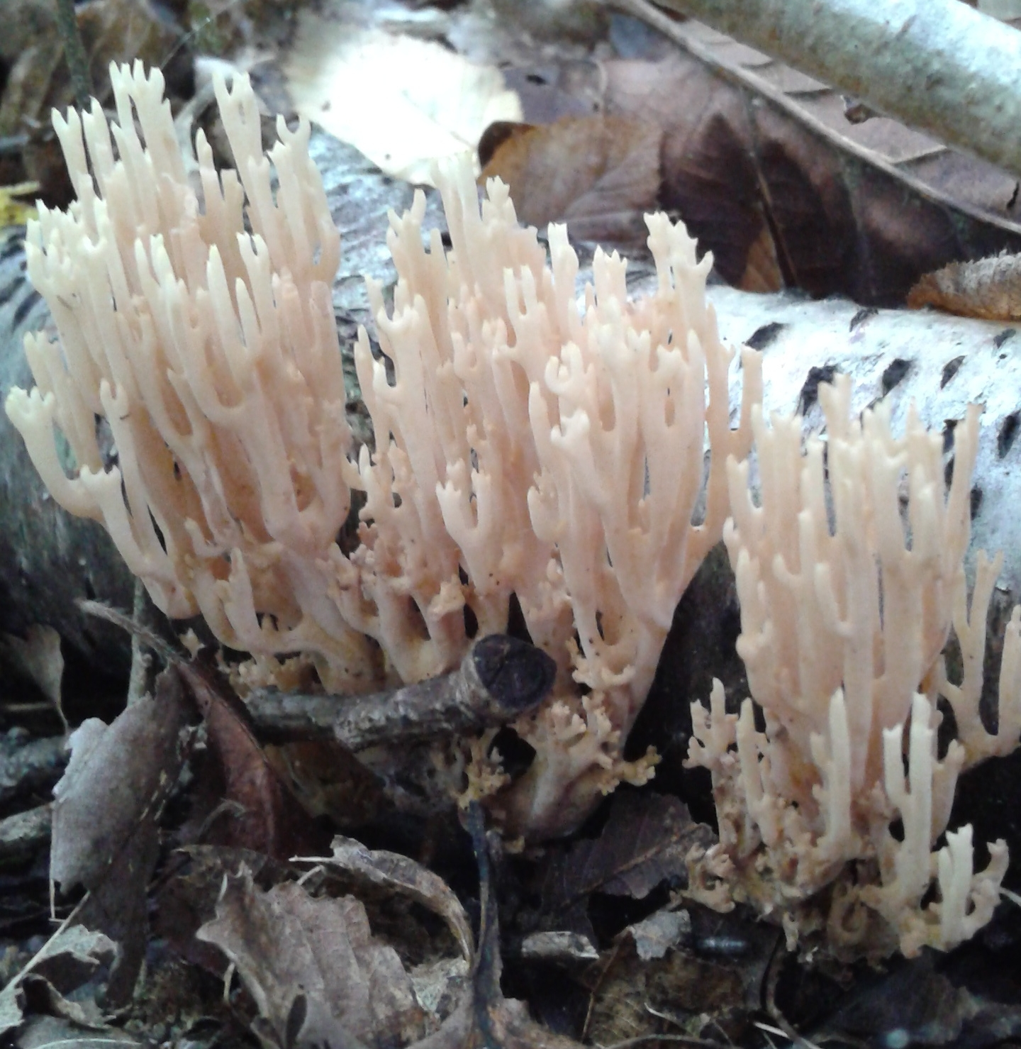 clavaire droite prise en foret du nord pas de calais photo prise en 2015